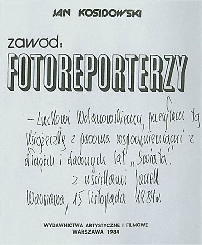 Jan Kosidowski (1922-1992)'s autograph - to Lucjan Wolanowski (1920-2006), Polish journalist and traveller